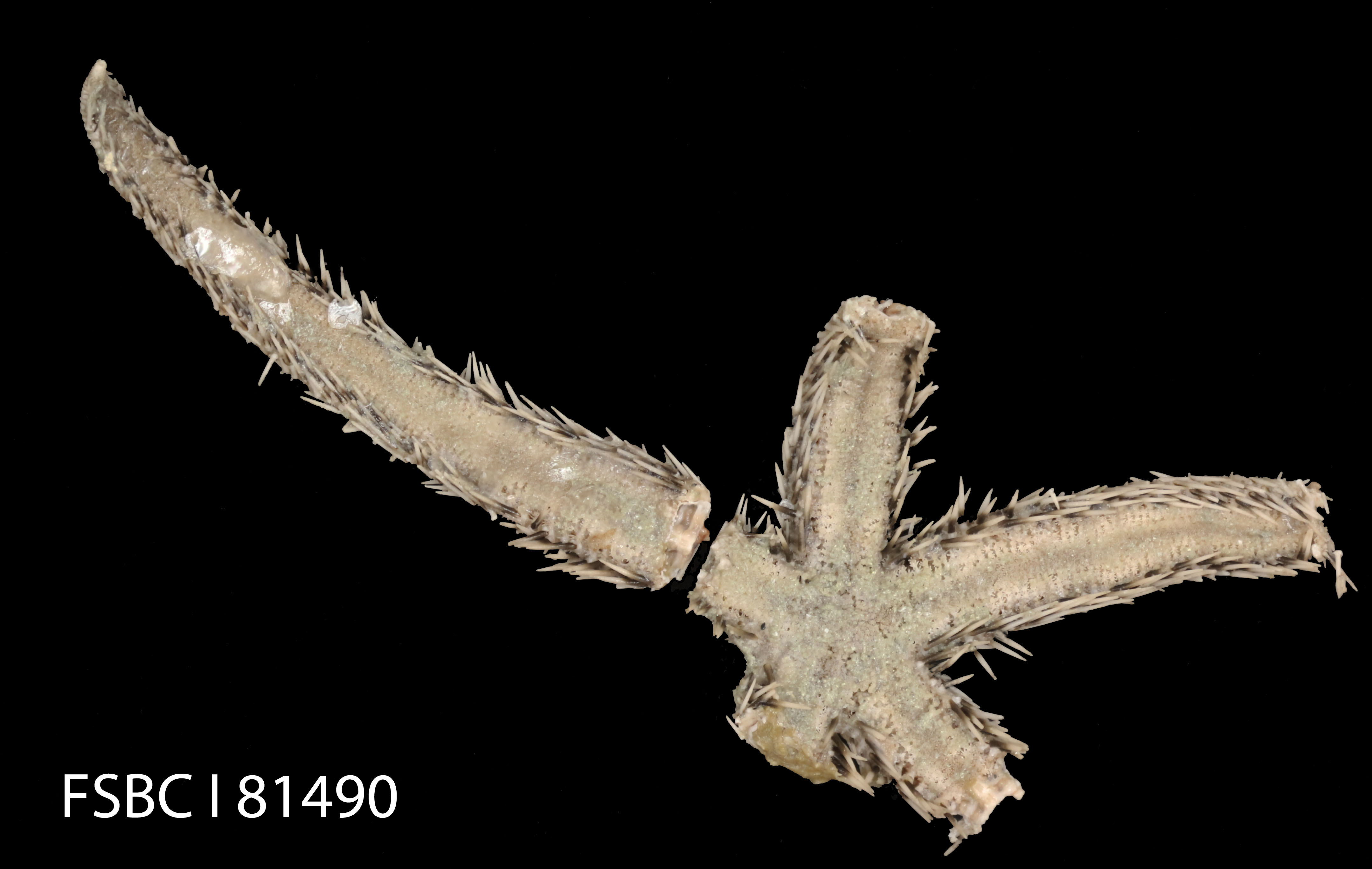 Scientific name: Luidia sagamina aciculata '